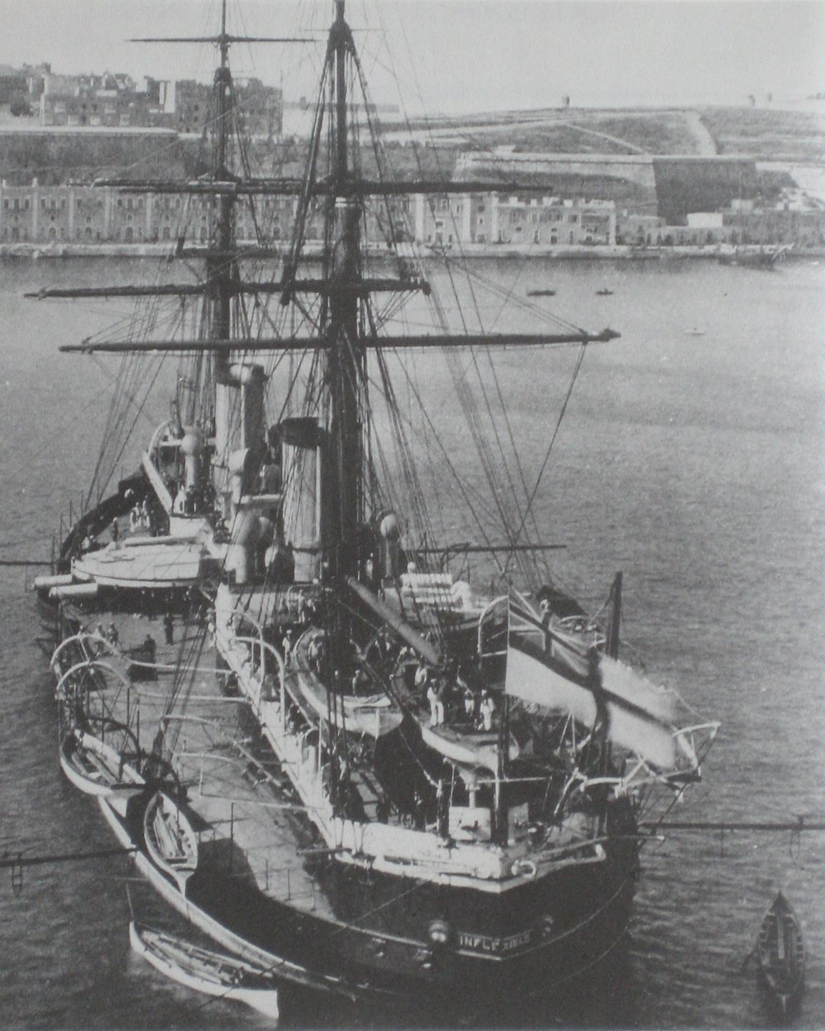 Das 1876 vom Stapel gelaufene britische gepanzerte Turmschiff HMS Inflexible.